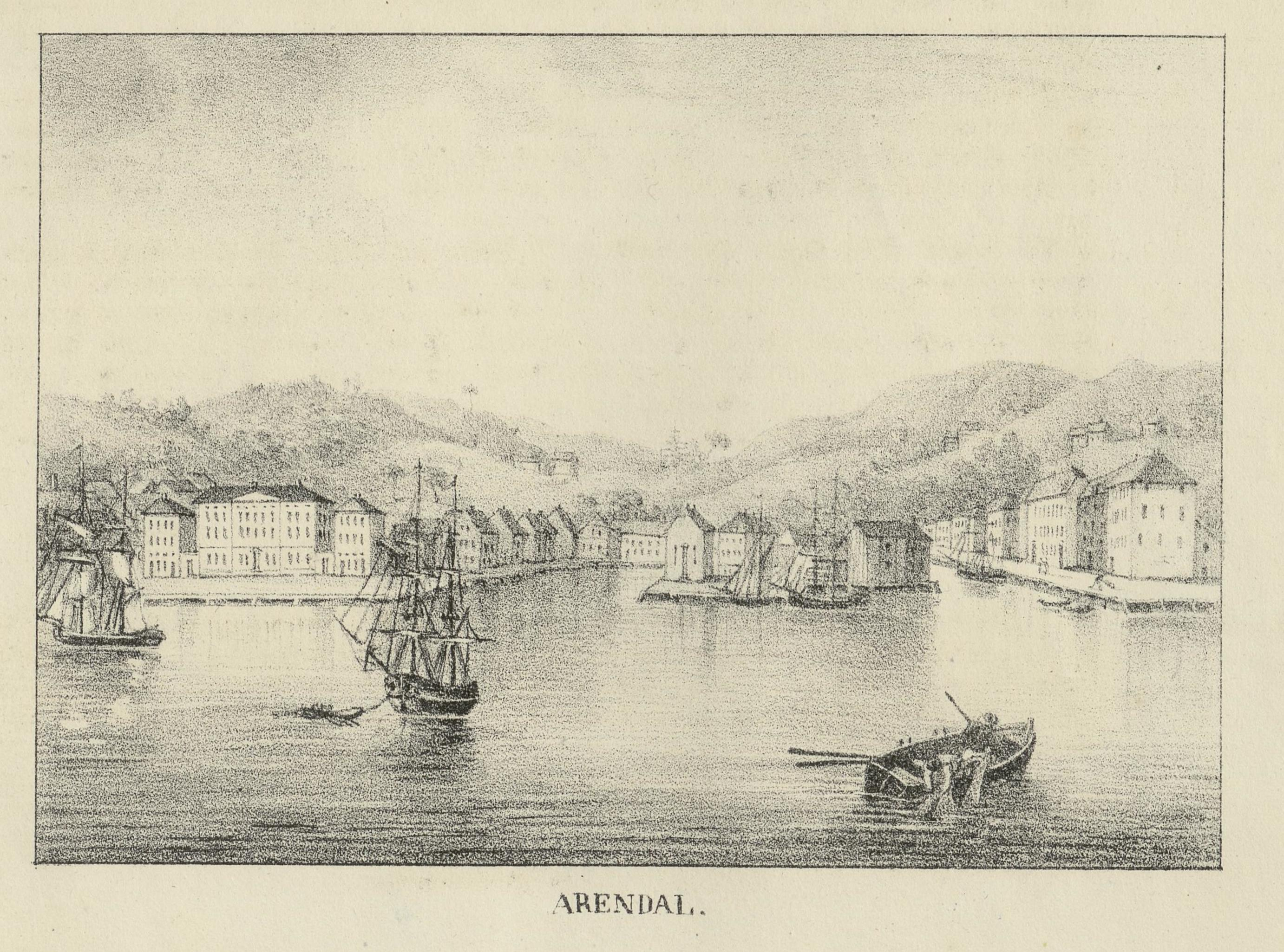 Illustrasjon hentet fra boken "Norge, fremstillet i lithographerede Billeder efter Naturen" av Wergmann, P.F. og utgitt av P.F. Wergmann (Christiania, 1836-1837)